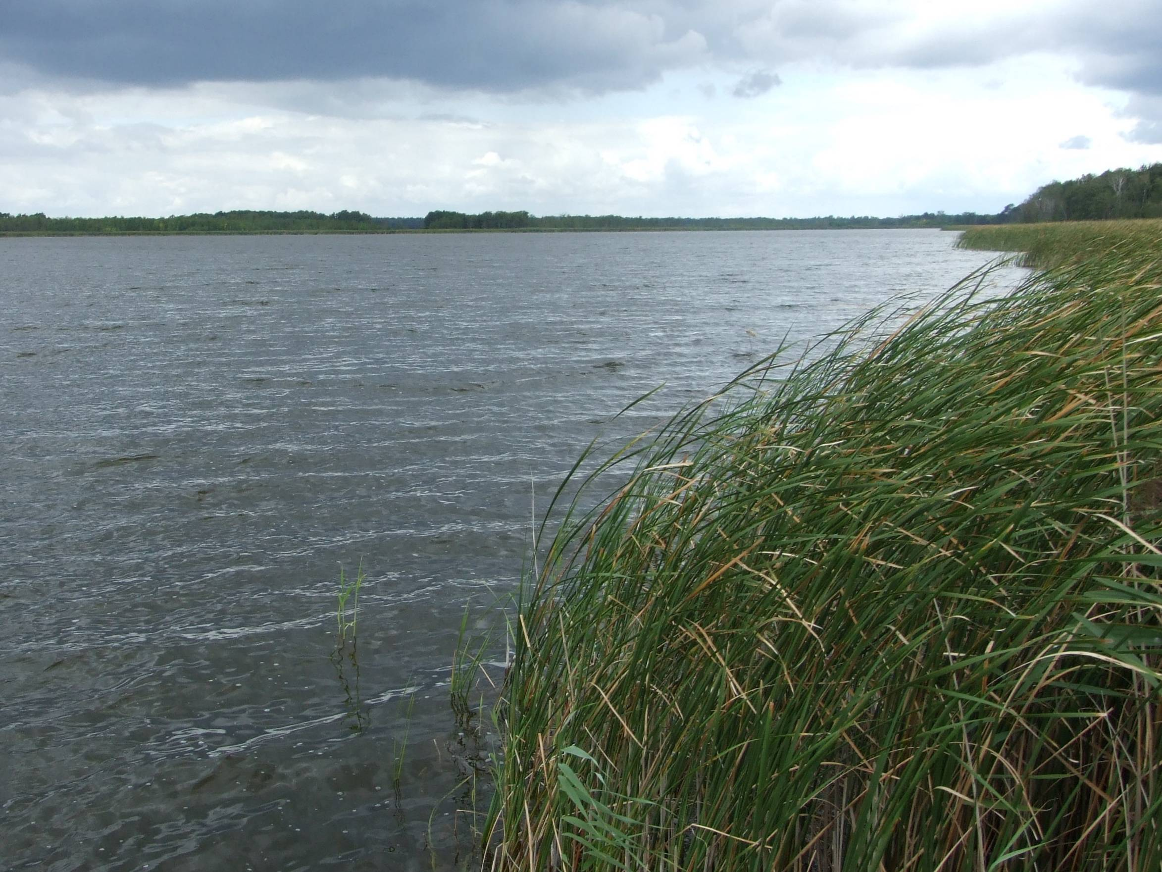 Blick auf den Großen Koblentzer See im Naturschutzgebiet „Großer Koblentzer See“